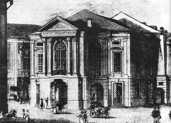 Stavovské divadlo. Bylo postaveno roku 1783, od roku 1797 bylo majetkem českých stavů. V letech 1785 - 1862 se tu o nedělích a svátsích konala česká odpolední představení.